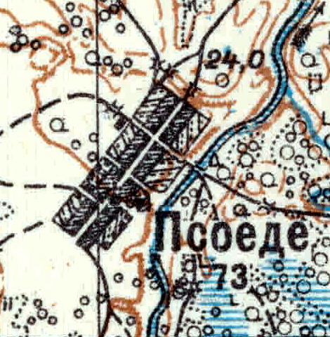 Топографическая карта Ленинградской области, квадрат VIc-27 (Залустижье), деревня Псоедь